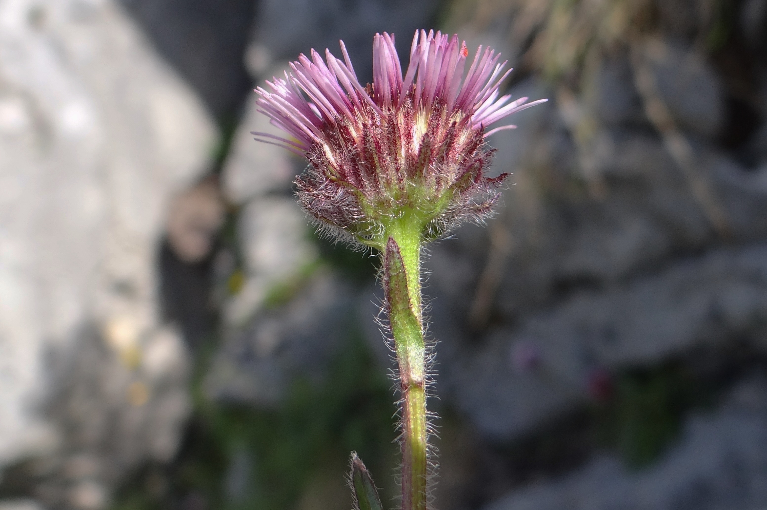 Erigeron uniflorus